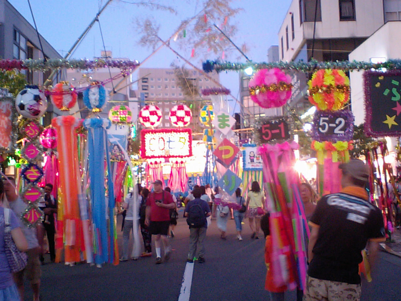 Tanabata_Festival in Fussa